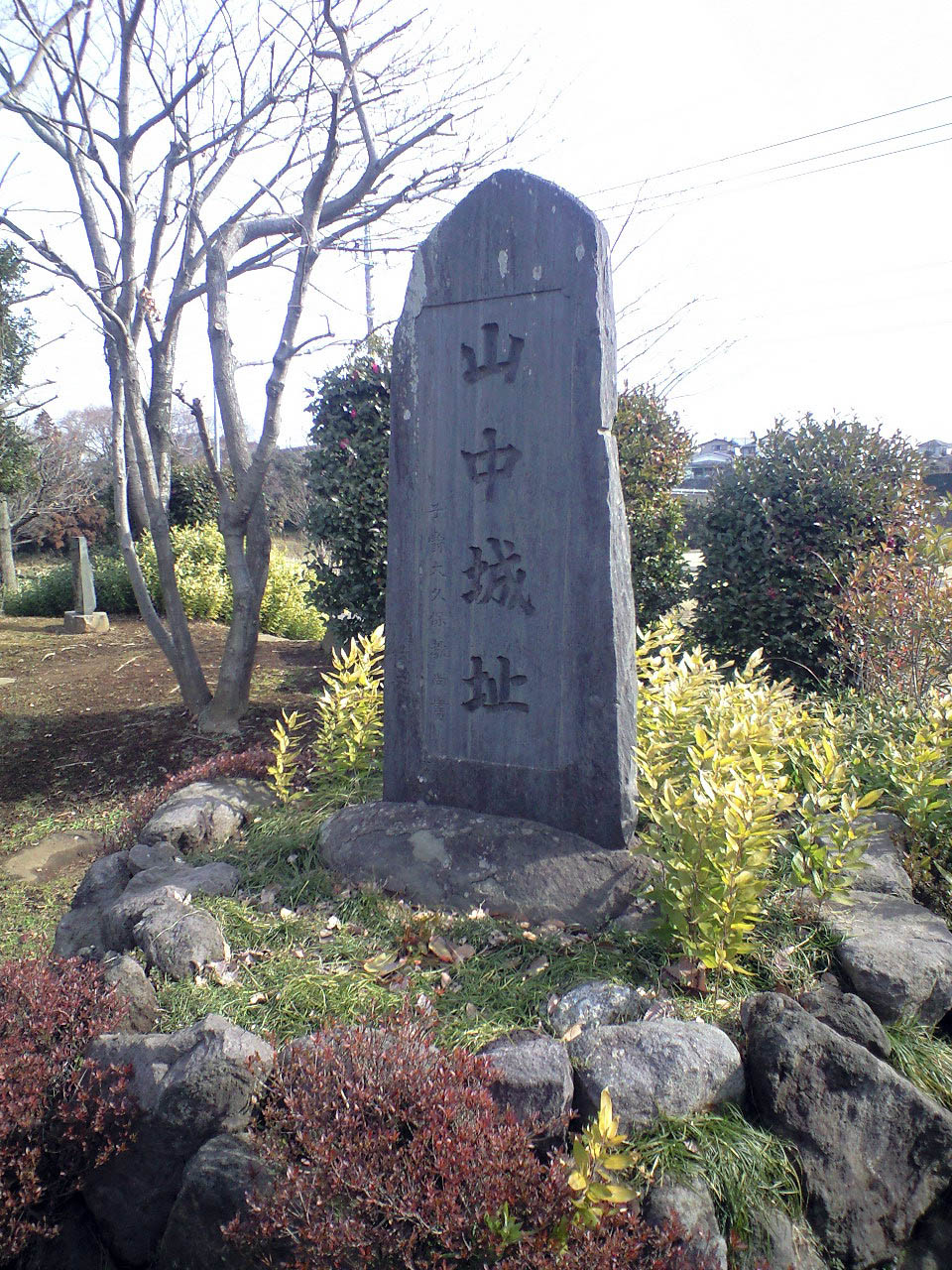 神奈川県厚木市下荻野、山中陣屋跡史跡公園内、「山中城址」碑（荻野山中陣屋址）。旧荻野村の村民によって建立された。